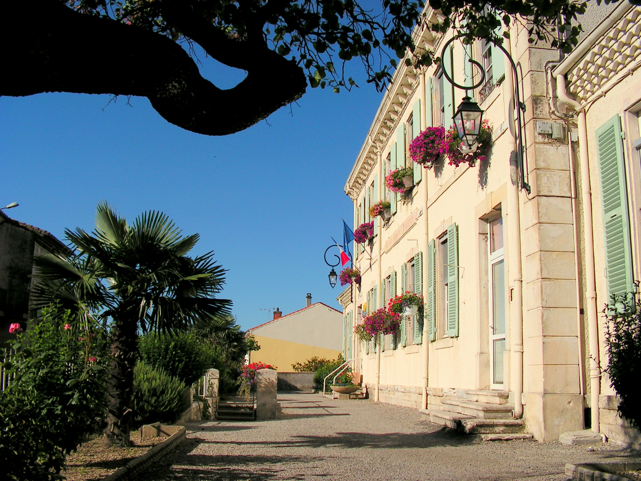 mairie